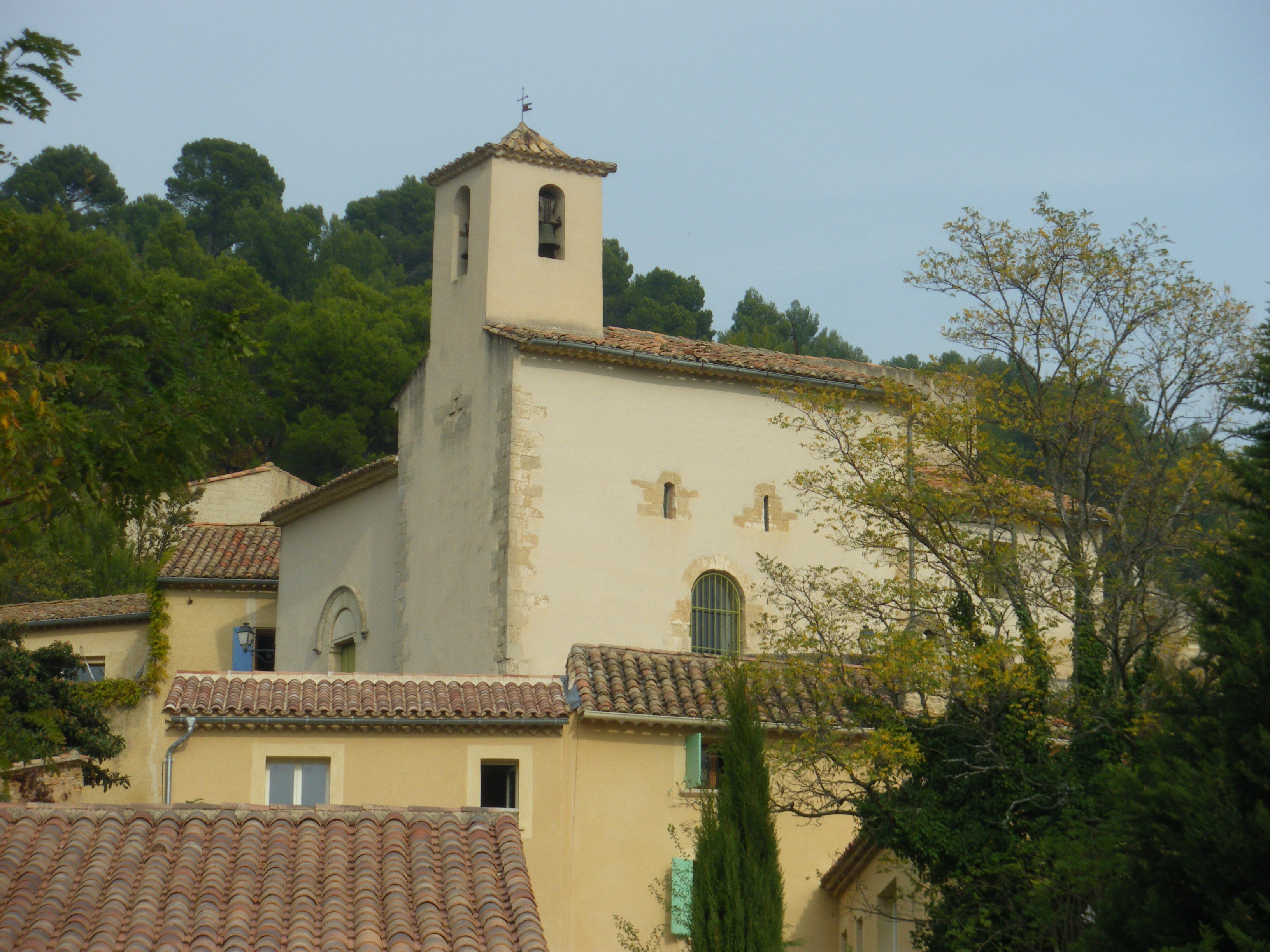 église de Lafare, Vaucluse, France